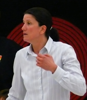 Photo der Basketballtrainerin Aleksandra Kojić